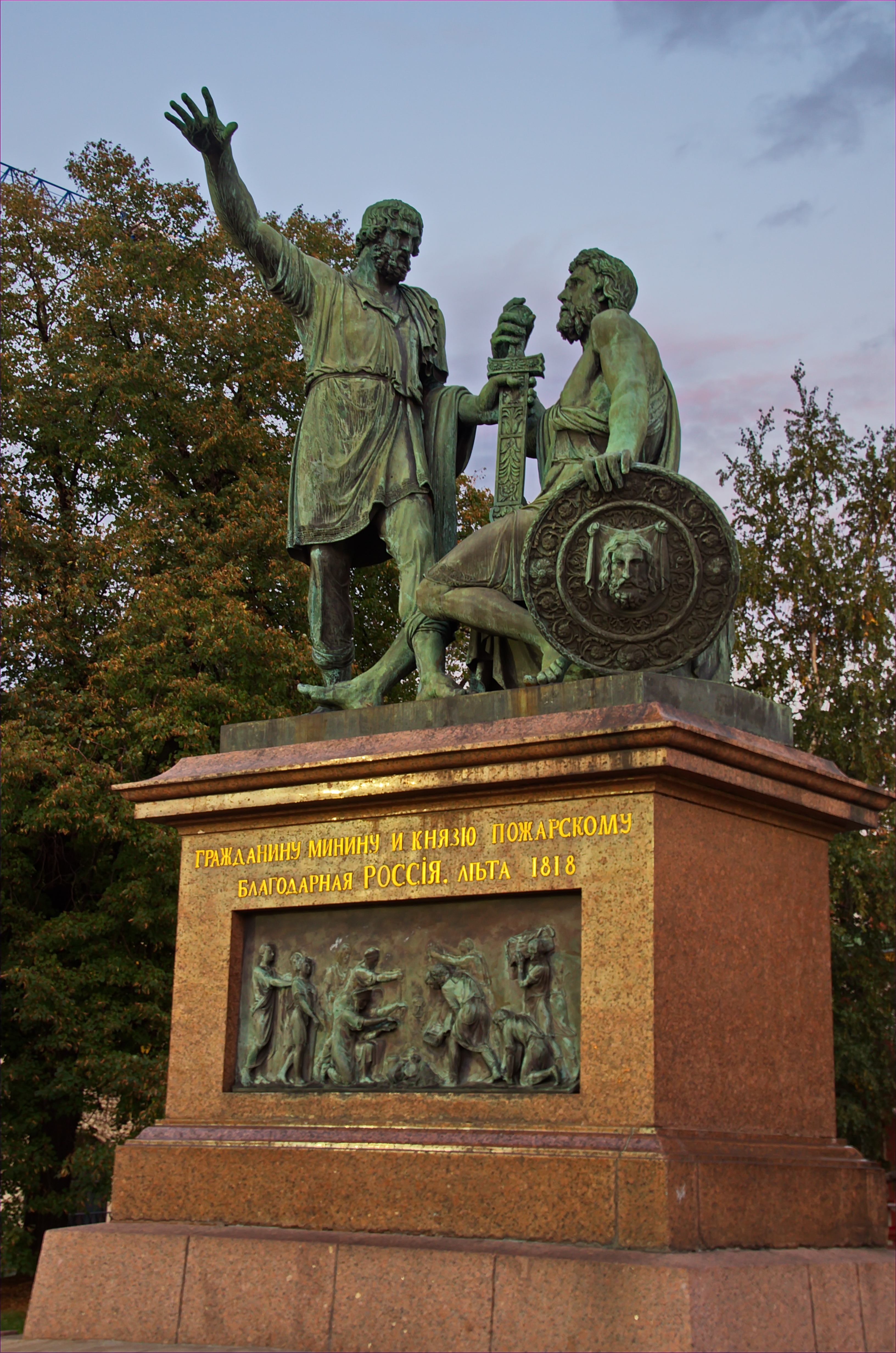 0340 - Moskau 2015